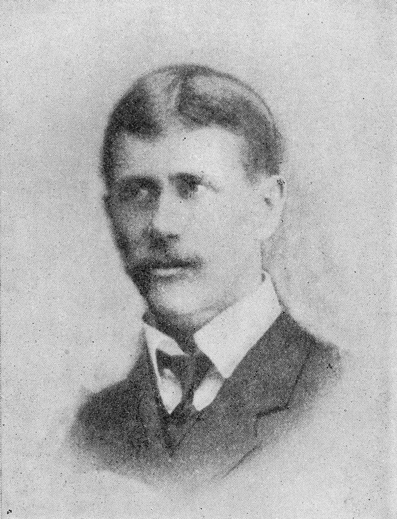 Janne Myyryläinen eli Jahvetti Moilanen